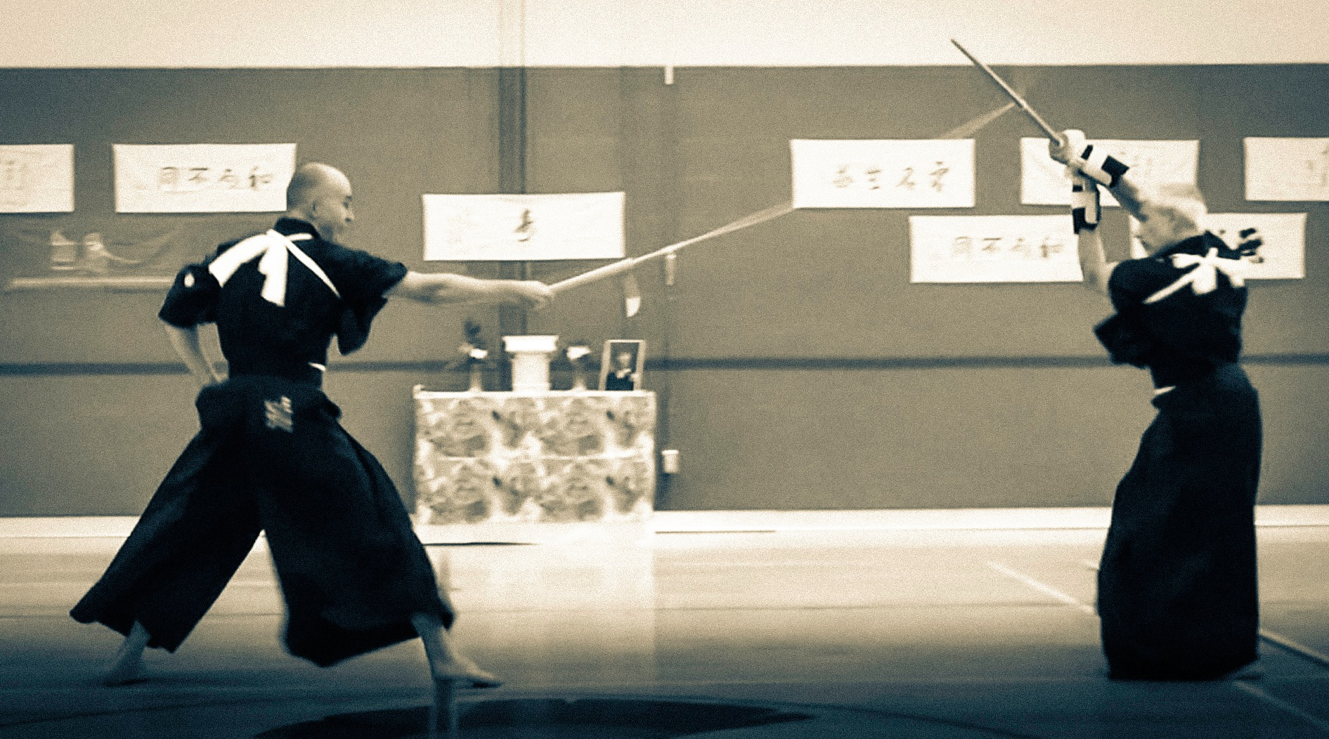 Tendo-ryu kusarigamajutsu